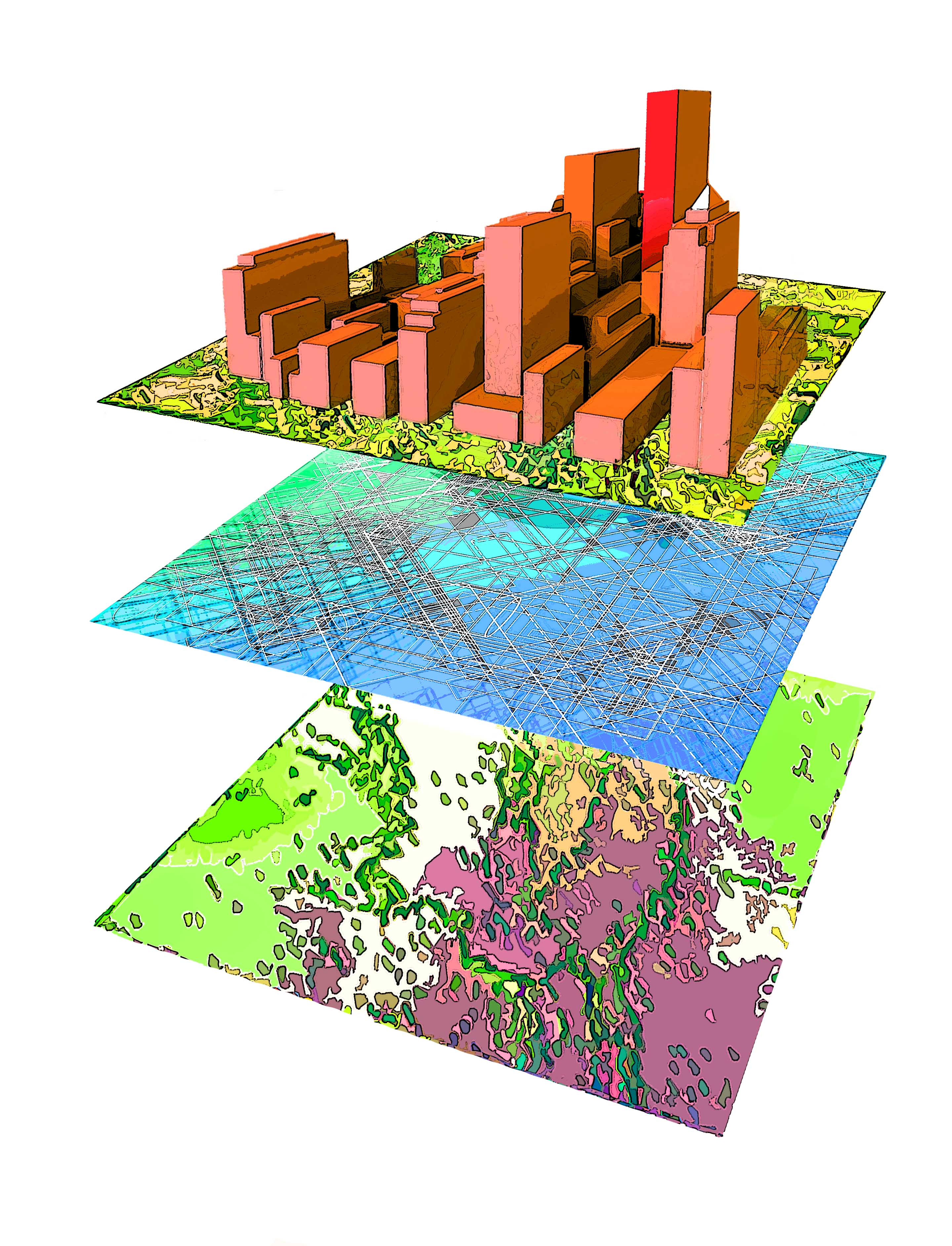 Design Di